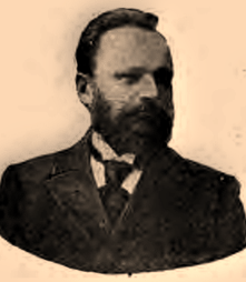 Josef Hannich (1843 - 1934), Český novinář a politik.